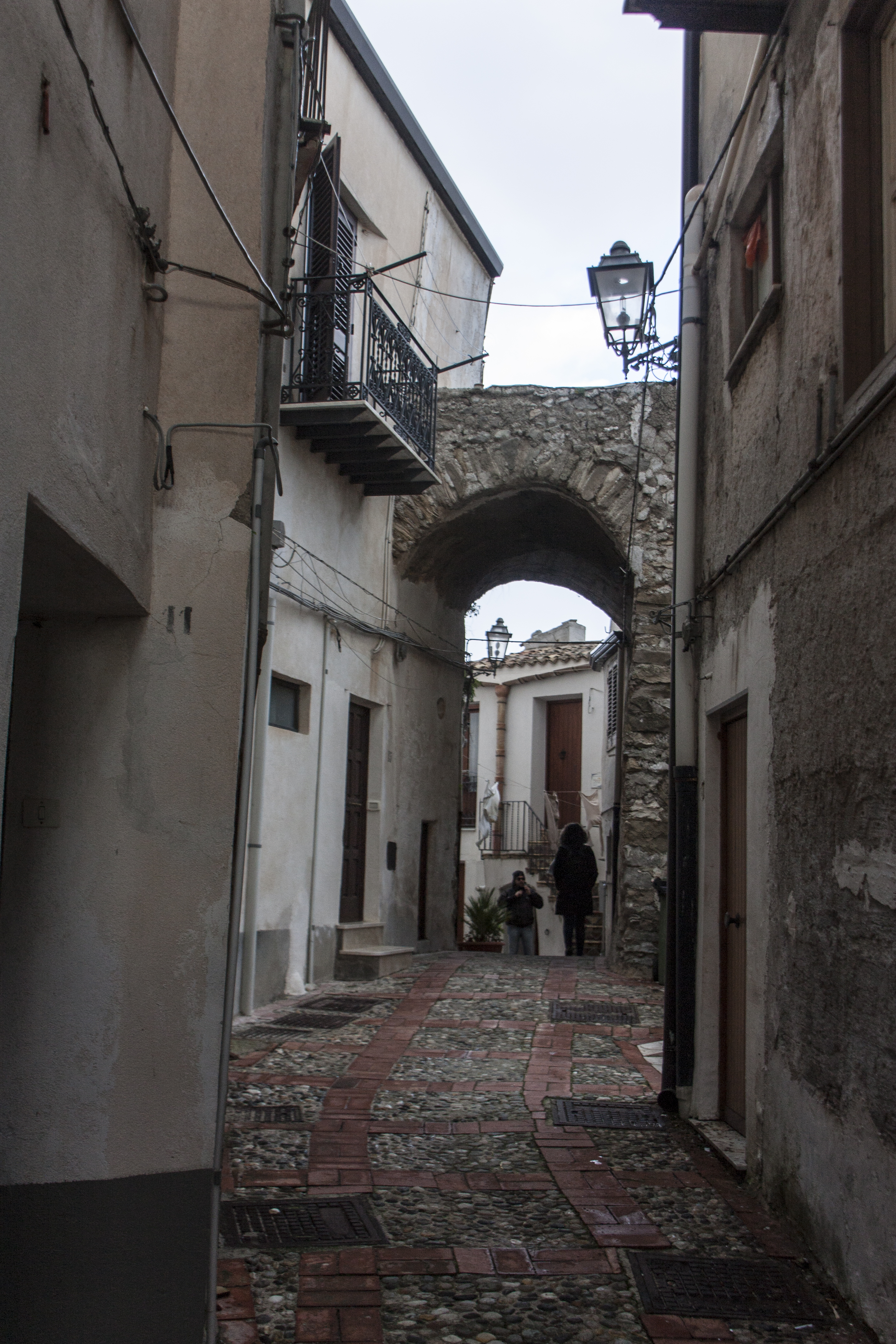 Rabato di Sutera